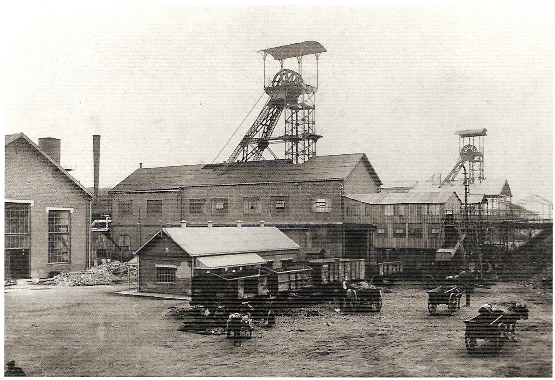 La Fosse n° 7 - 7 bis de la Compagnie des mines de l'Escarpelle était un charbonnage constitué de deux puits situé à Courcelles-lès-Lens, Pas-de-Calais, Nord-Pas-de-Calais, France.